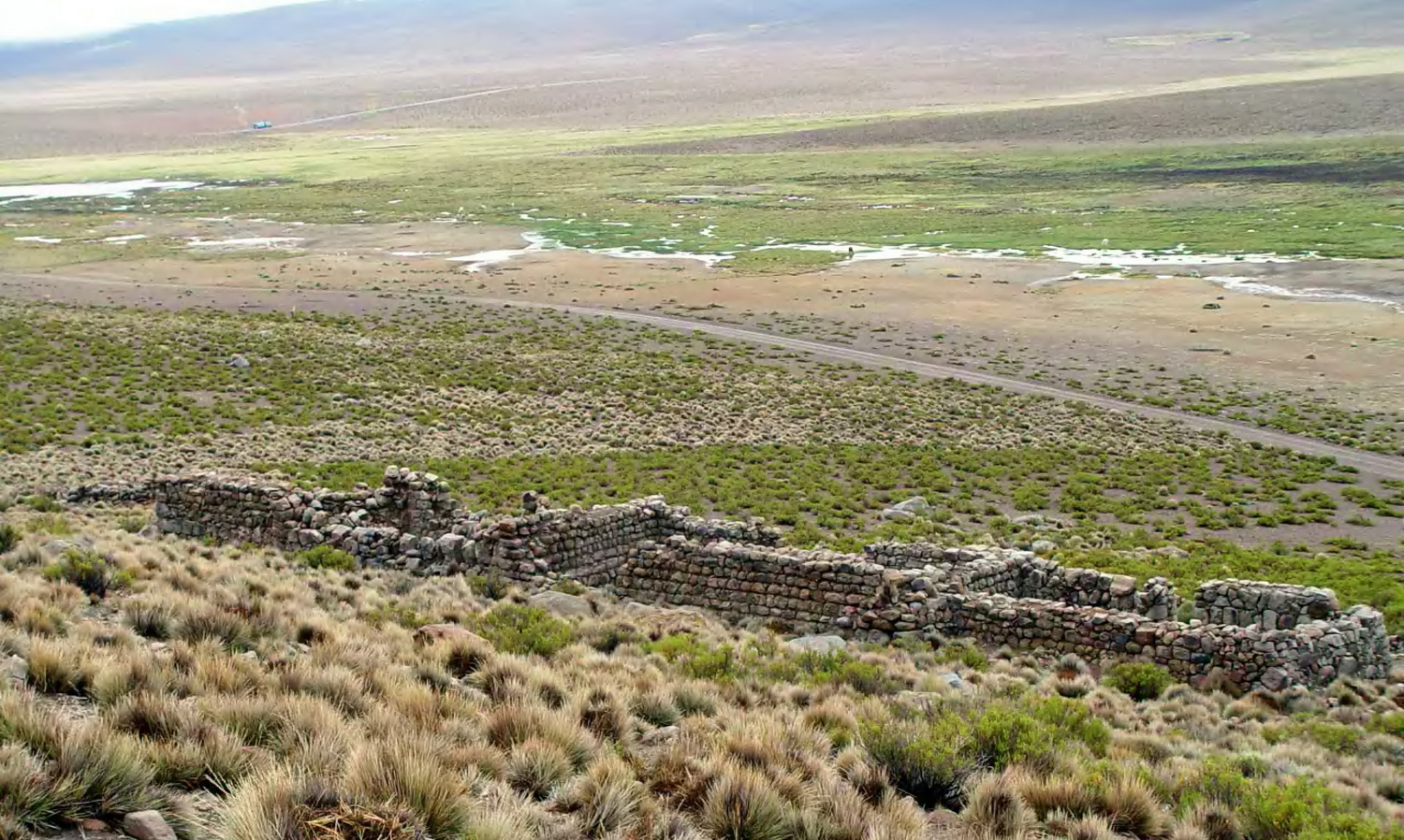 Tambo de Chungará This is a photo of a national monument in Chile: 265